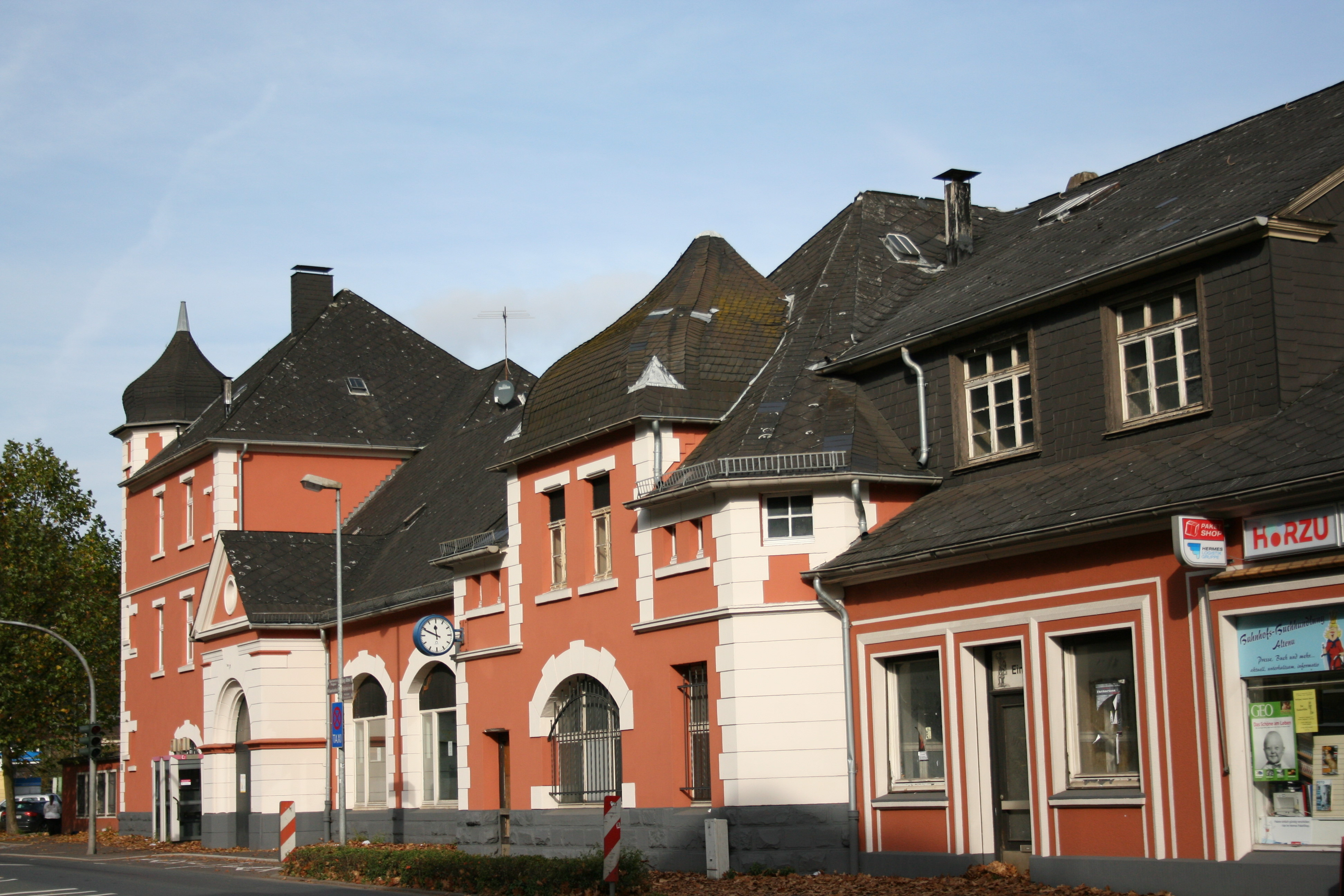 Bahnhof in Altena